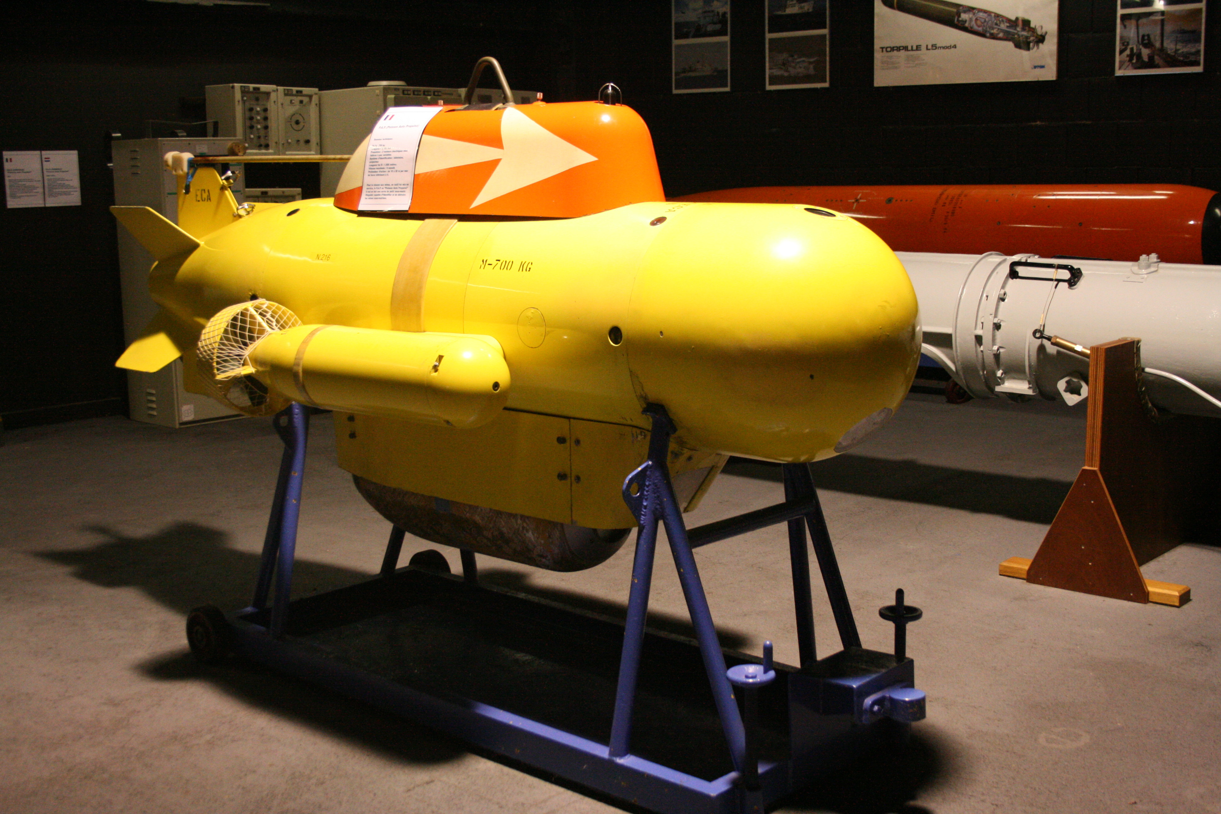 Poisson Auto Propulsé (P.A.P.). Est employé pour la chasse aux mines sous-marines. Ce petit sous-marin filoguidé les identifie et les détruit.